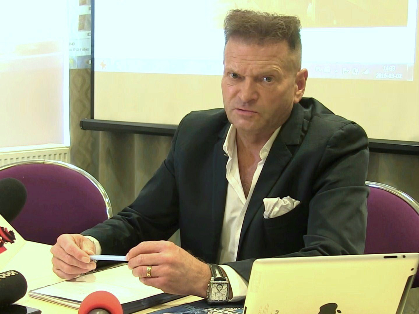 Krzysztof Rutkowski, przedsiębiorca, były milicjant, polityk i detektyw.